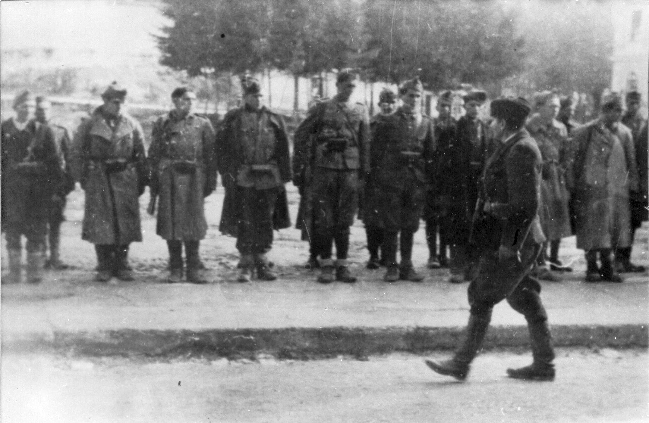 Tito passa in rivista i partigiani della Terza brigata d'assalto della Craina dopo la liberazione di Bihac nell'ottobre 1942